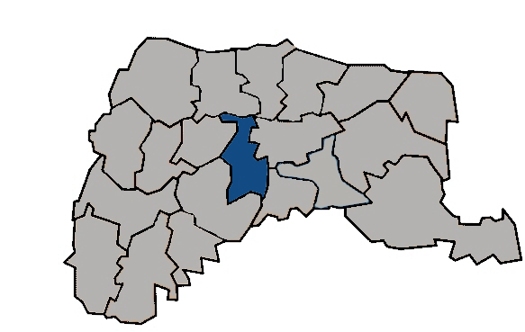 台灣省雲林縣土庫鎮 KaurJmeb於2005年1月28日為編輯zh:土庫鎮所繪製